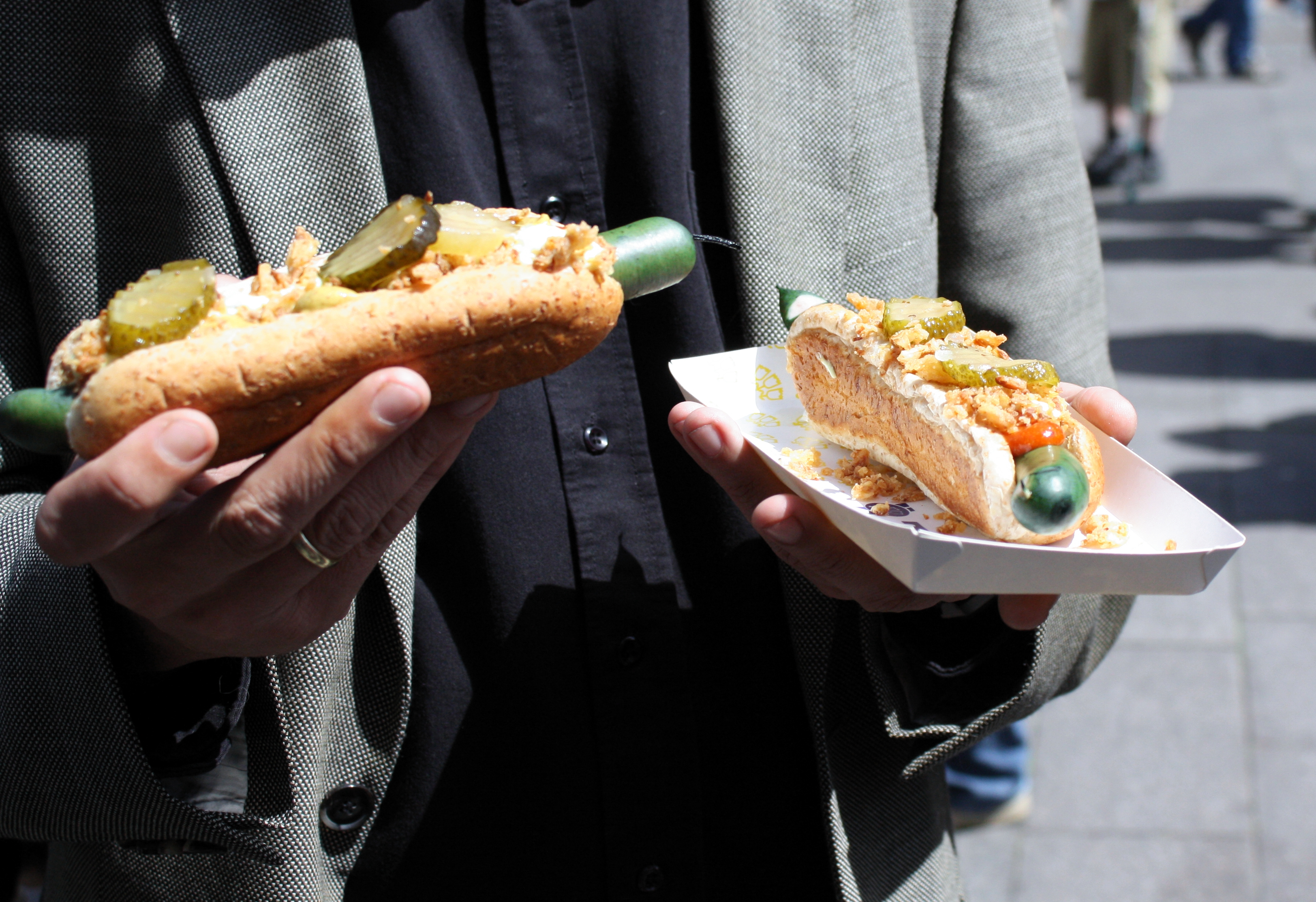 I anledning af den nationale hotdog-dag var der grønne pølser.